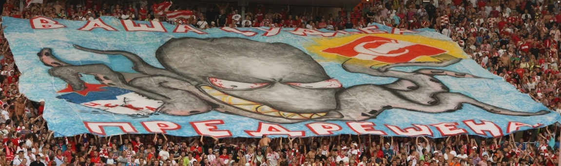 Перфоманс "Ваша судьба предрешена" в матче с ЦСКА в "Лужниках". 2010 год